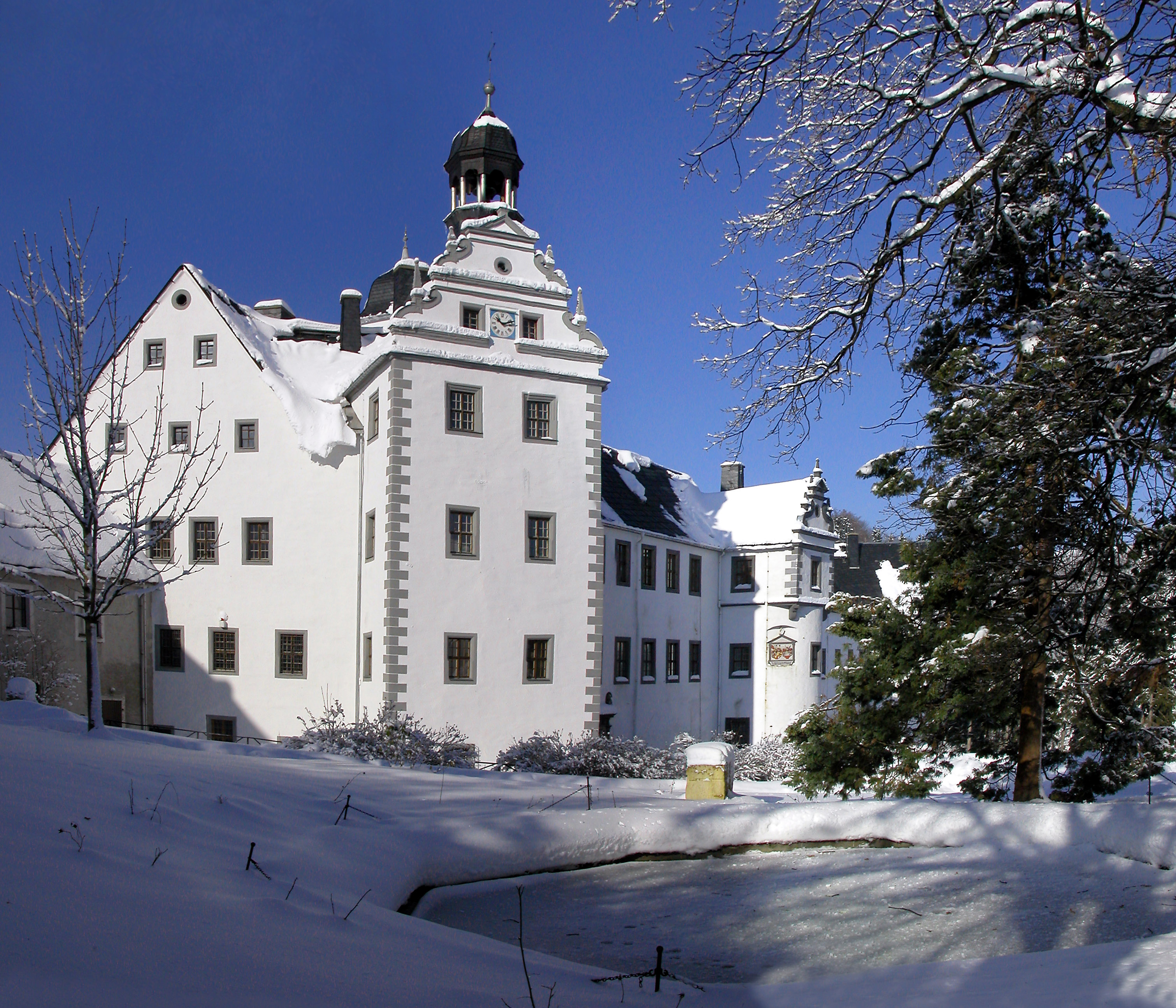 05.02.2005 01778 Lauenstein: Burg/Schloß: Spätgotische Anlage, 14. und 15 Jh., im 16. und 17. Jh. umgebaut und ergänzt. Burg von Westen. [DSCN5849.TIF]20050205140.DR.JPG(c)Blobelt [Infotafel zur Schloßkapelle, 18.03.2006, Rohbild DSCN9059.JPG:] Im Jahre 1464 erwarb der bürgerliche Montanunternehmer Hans Müntzer, der in Freiberg, Altenberg und in Graupen (Krupka) sehr wohlhabend geworden war, Lauenstein. Dessen Söhne Hans und Eberhard Müntzer ließen um 1480 den Westflügel des Schlosses und die Schloßkapelle errichten. Kanzel von 1653. Im Jahre 1808 wurde die Kapelle in ein Speisegewölbe umgewandelt. Später diente sie als Jagdzimmer und Abstellraum. 1983/84 restauriert. die an den Wänden angebrachten Konsolköpfe aus Sandstein entstanden um 1600 und dienten im Trompetersaal der Burg Lauenstein vermutlich als Gewölbeanfänger. Nachdem dieser Saal 1840 abgetragen worden war, kamen die Köpfe in die Schloßkapelle. die Köpfe stellen wahrscheinlich die die Mitglieder der Familie Bünau dar, die von 1517 bis 1821 im Besitz des Schlosses waren. Man nimmt an, daß die Köpfe ab 1563 von den den Pirnaer Bildhauern Micheal Schwenke oder Lorentz Hörnigk geschaffen wurden, die auch die reiche Ausstattung der Lauensteiner Kirche besorgten.